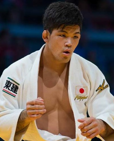 柔道グランプリデュッセルドルフ2016 photo by C.Fidler